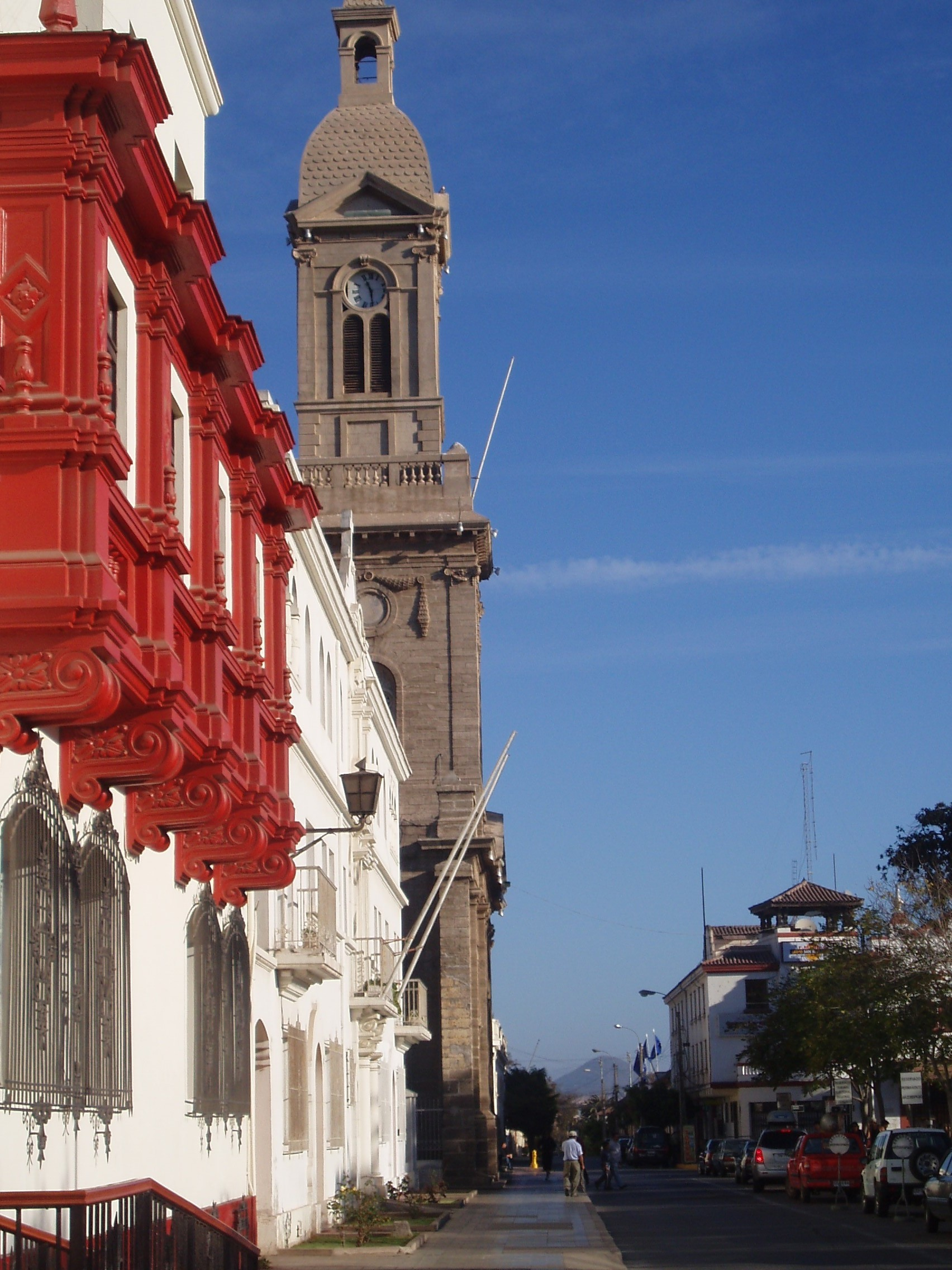 Vista de la calle Los Carrera de La Serena, frente a la Plaza de Armas. Se aprecia a la izquierda el edificio de la Corte de Apelaciones y la Catedral de la ciudad